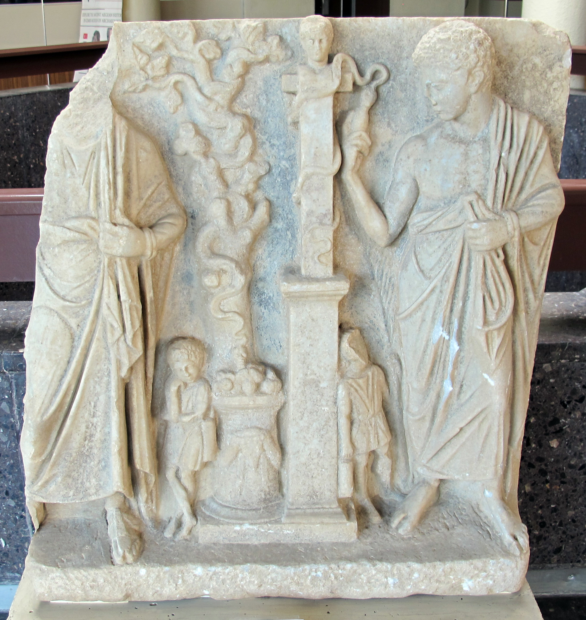 Periodo ellenistico, rilievo funebre, II sec. ac., da kyme